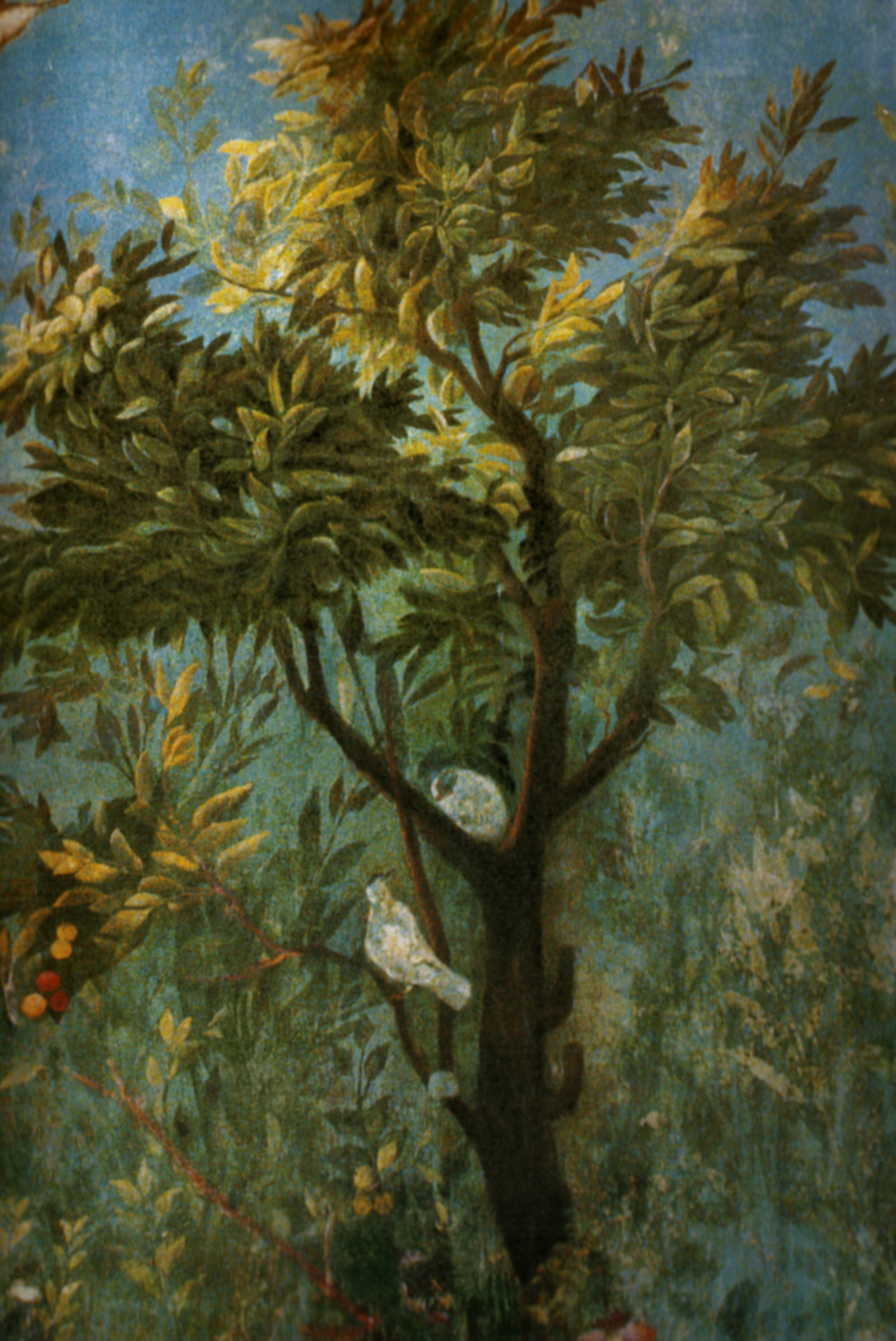 Villa di livia, affreschi di giardino, parete corta meridionale, dettagllio 02